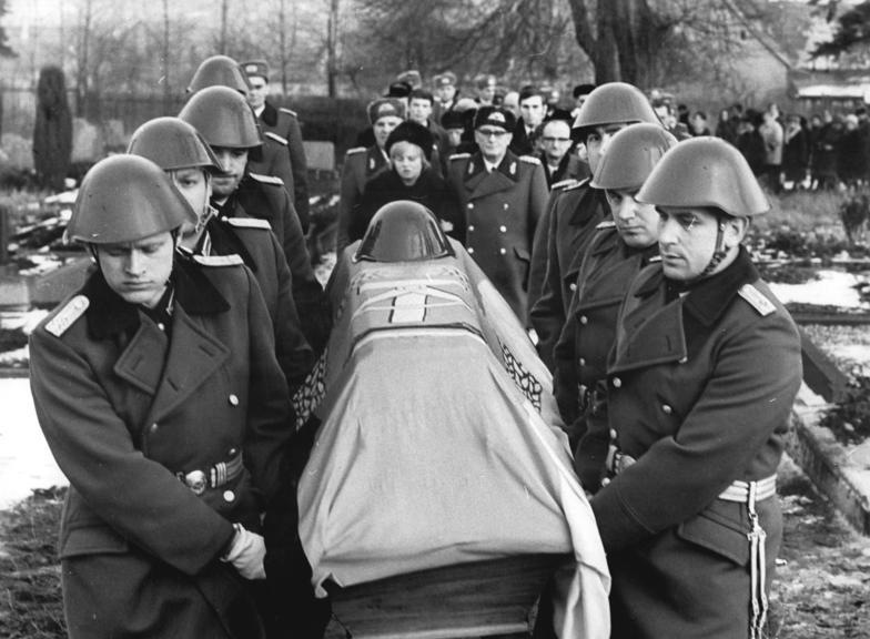 ADN-ZB Schaar-22.1.72-Krs. Eisleben: Beisetzung des NVA-Leutnants Lutz Meier- Der Leutnant der nationalen Volksarmee Lutz Meier der im Alter von 23 Jahren während der Ausübung seines Dienstes zum Schutz der Staatsgrenze der DDR einem feigen Mordanschlag zum Opfer fiel, wurde am 22.1.72 in Ahlsdorf, Kreis Eisleben, mit militärischen Ehren beigesetzt.